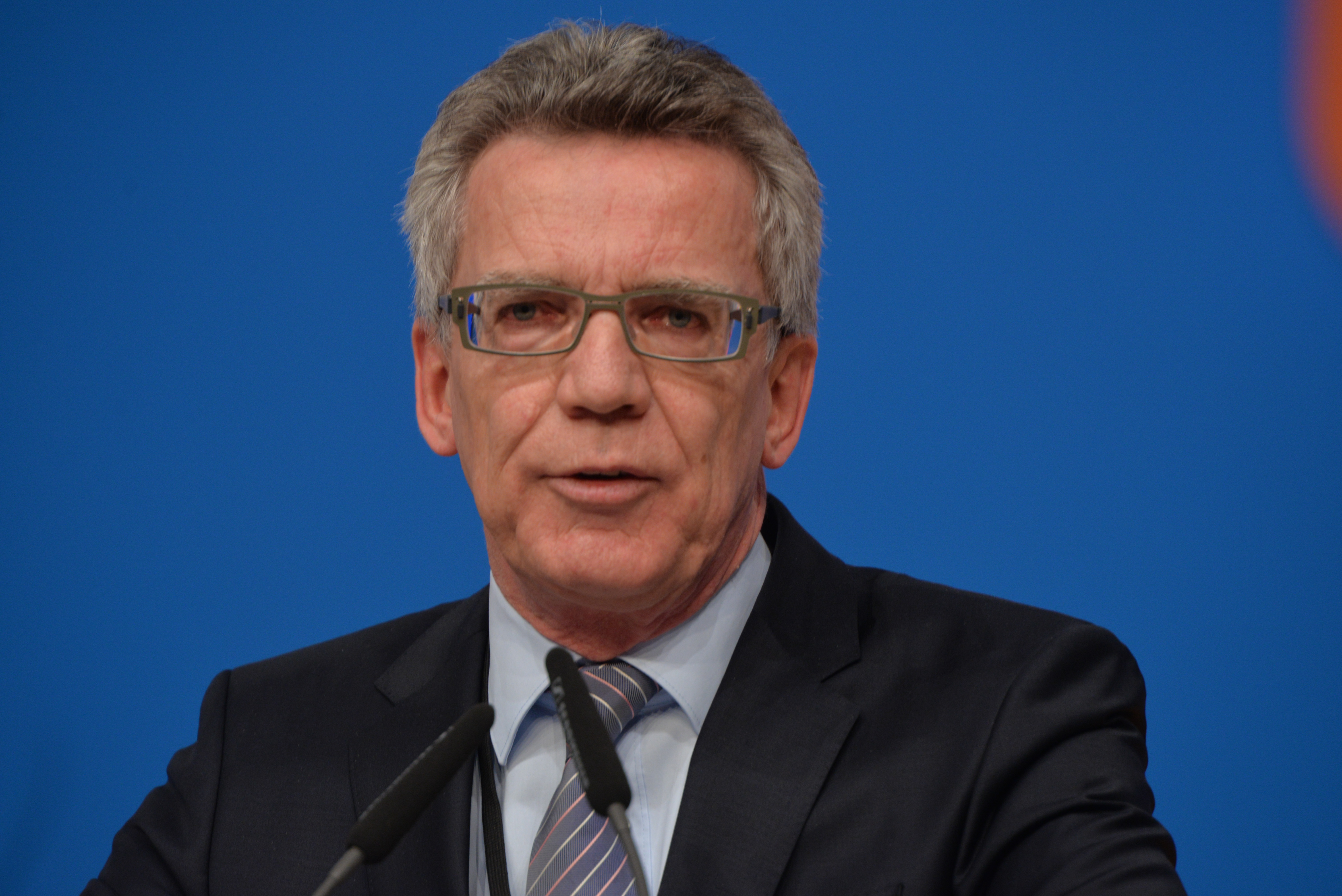 28. Parteitag der CDU Deutschlands am 14. Dezember 2015 in Karlsruhe